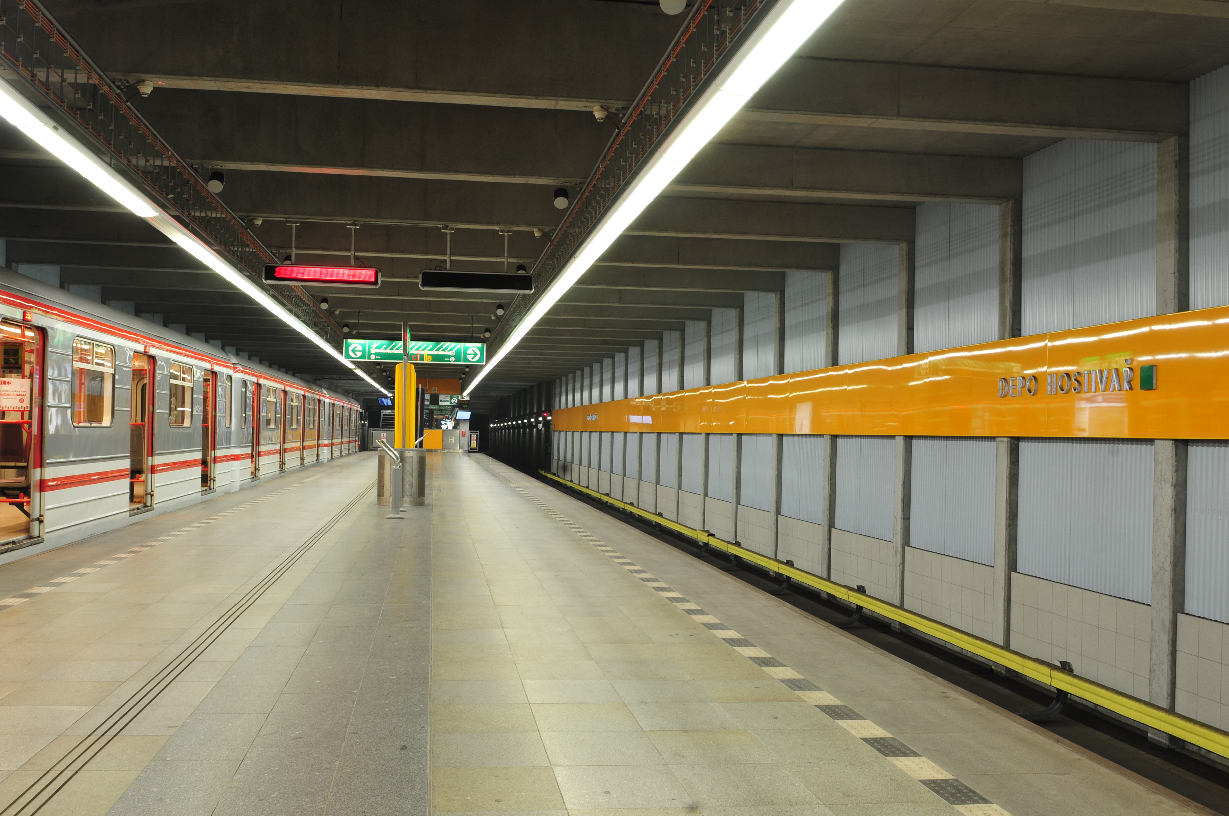 Metro Praha